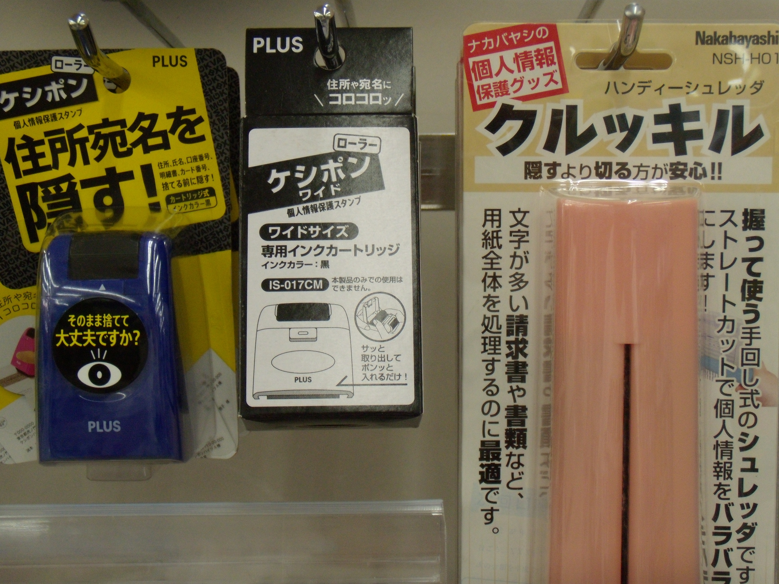 文房具における比較広告的内容を記したパッケージ。